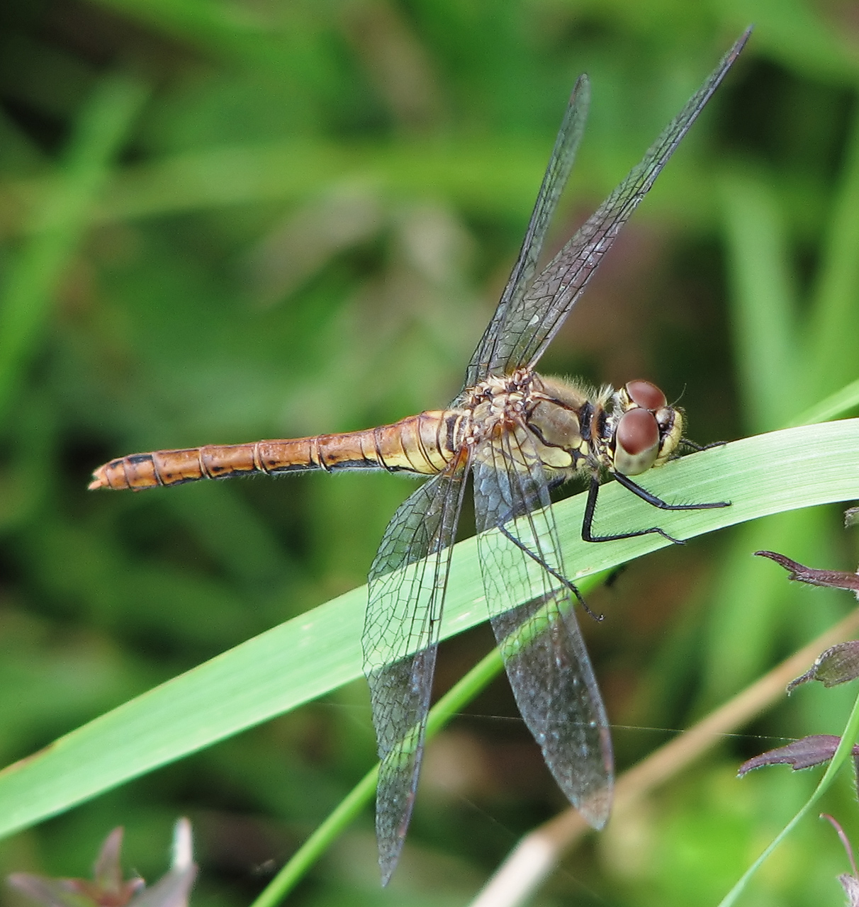 Beschreibung: Blutrote Heidelibelle / Weibchen / female (Sympetrum sanguineum) Fotograf: Darkone, 18. August 2005